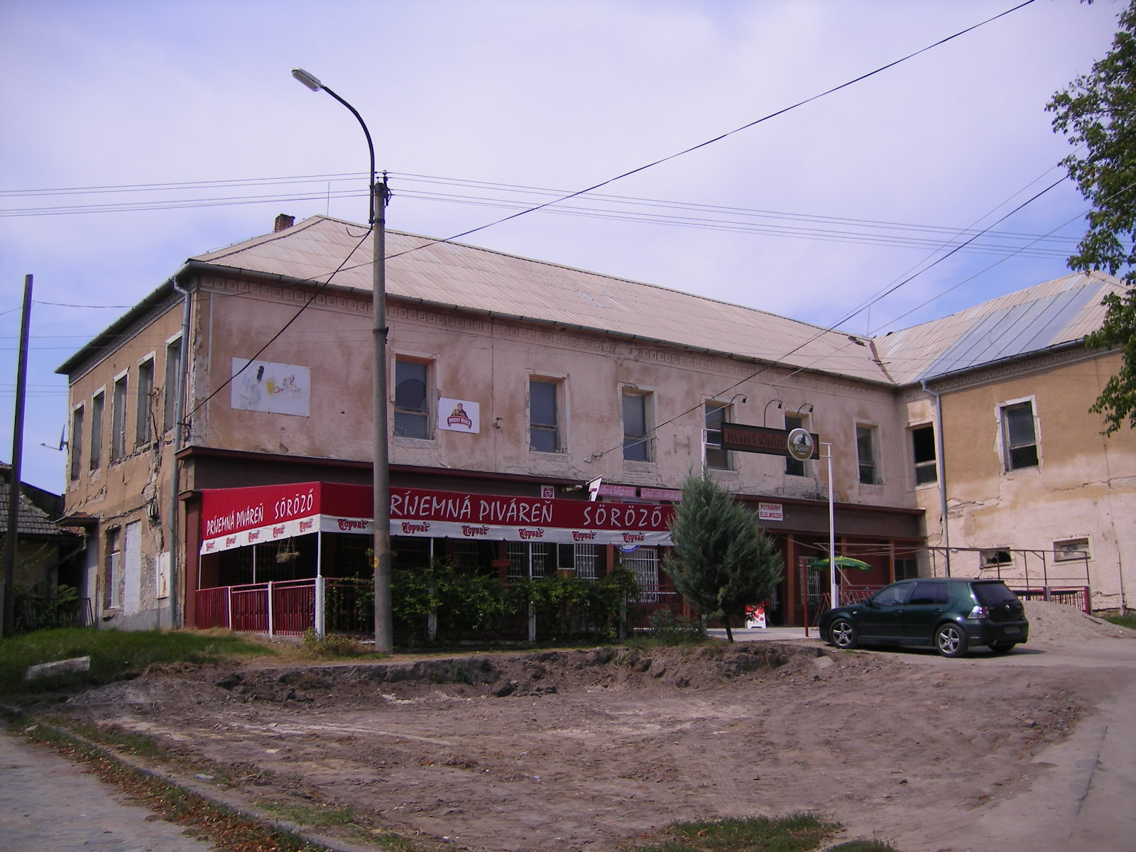 Bajcs- régi püspöki kastély